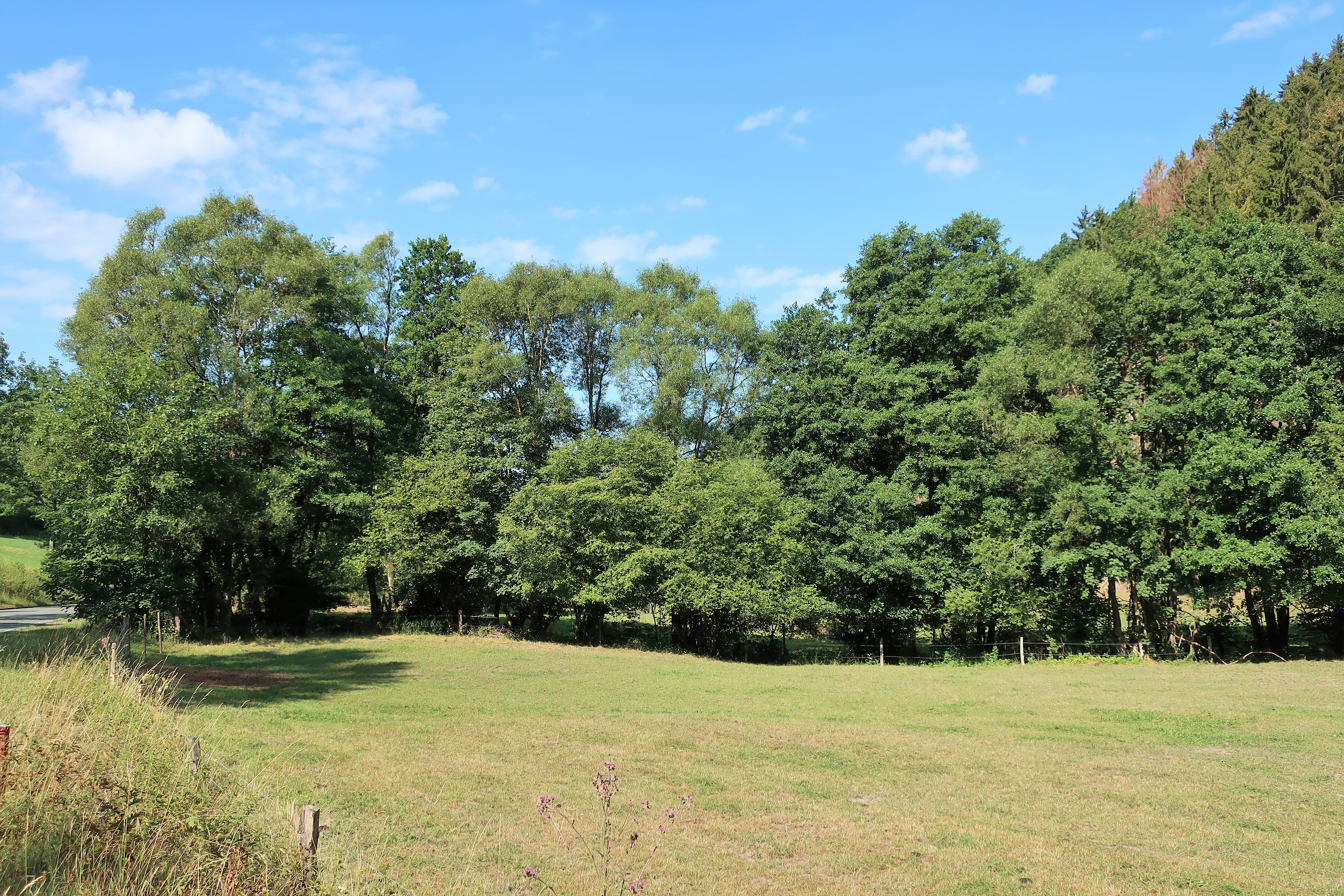 Naturschutzgebiet Bremgetal und Seitentäler in Attendorn. Teilansicht mit der unter den Bäumen fließenden Bremge zwischen Bremge/Biggesee und Bürberg.